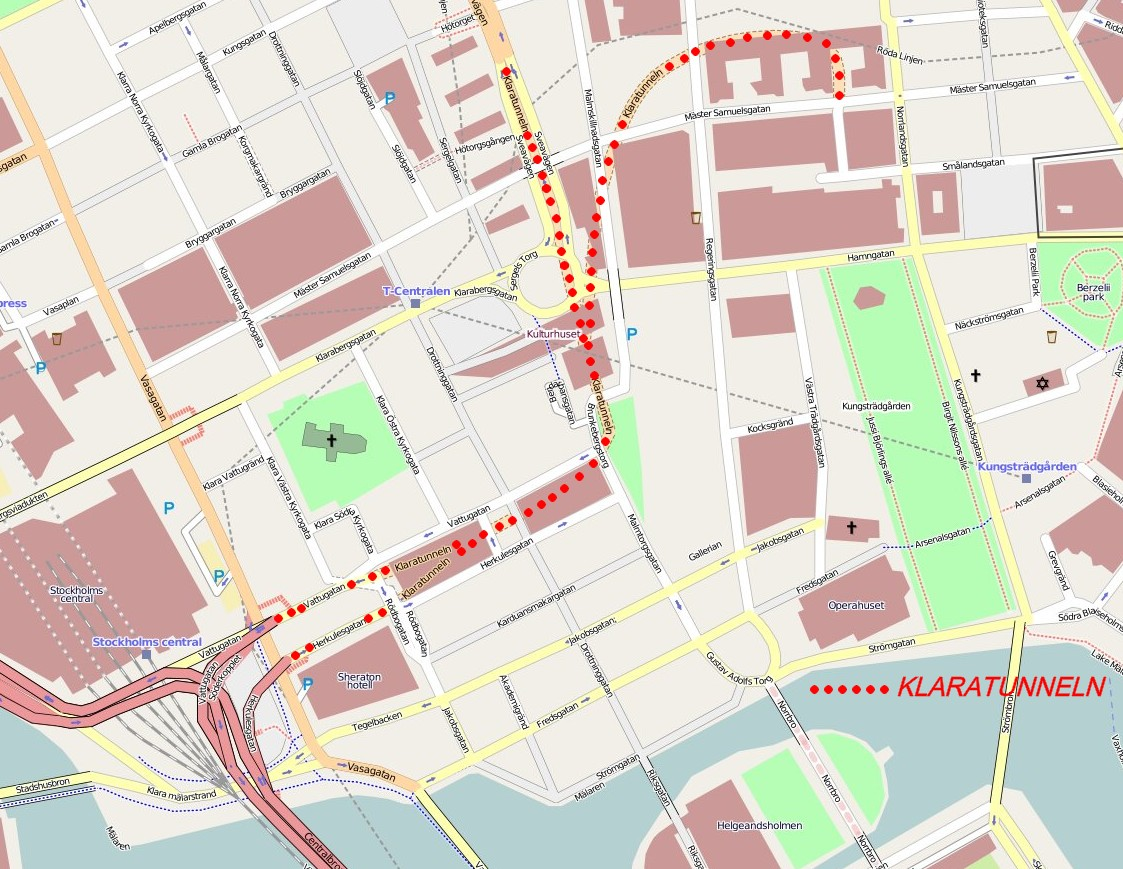 Karta över Stockholms city med Klaratunneln This map may be incomplete, and may contain errors. Don't rely solely on it for navigation.